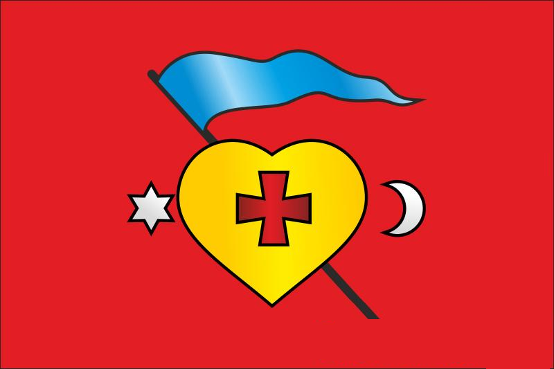 Прапор Батурина